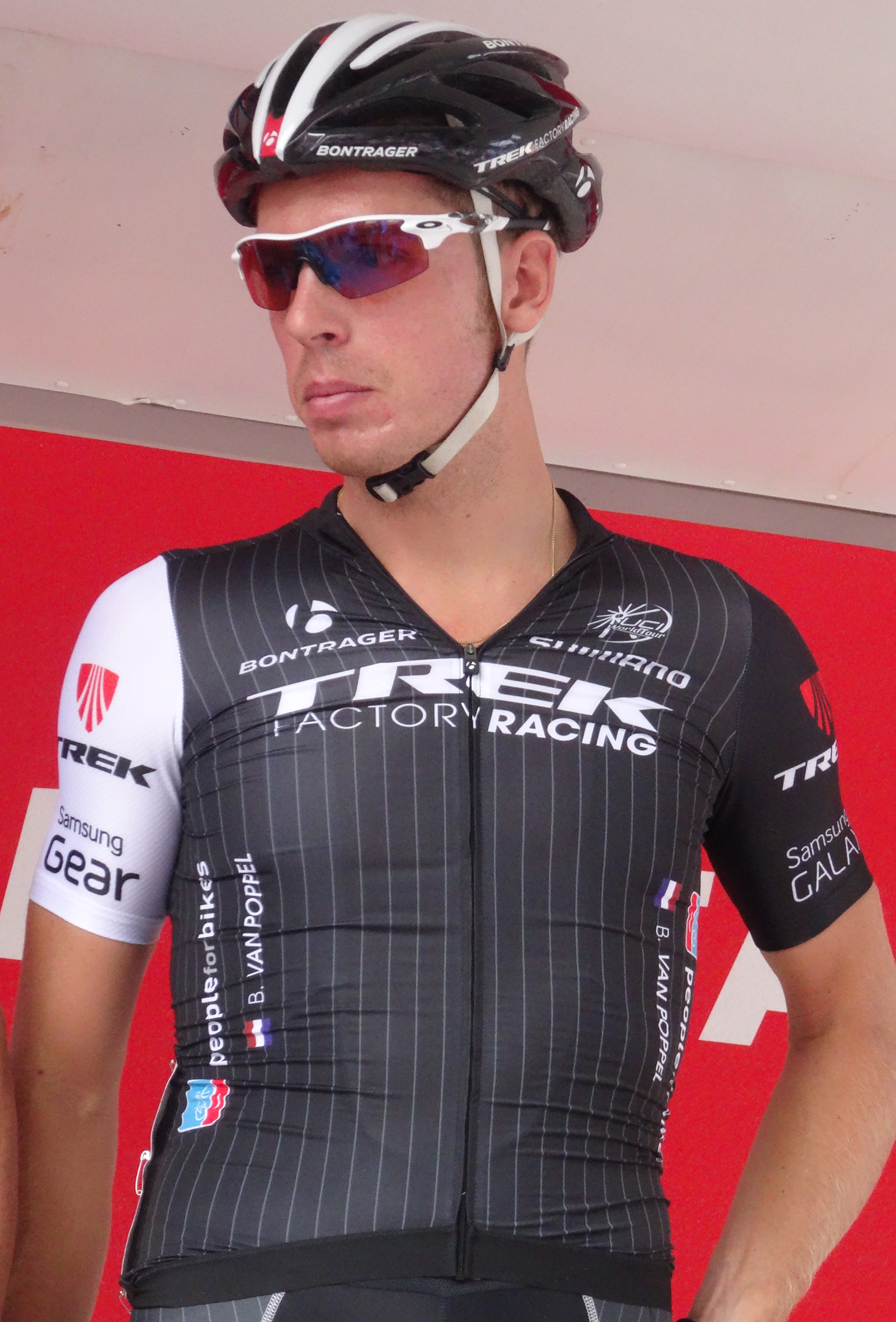 Reportage photographique réalisé le samedi 26 juillet à l'occasion du départ de la première étape du Tour de Wallonie 2014 à Frasnes-lez-Anvaing, Belgique.